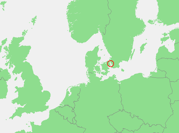 In dutch: Locatie Sont